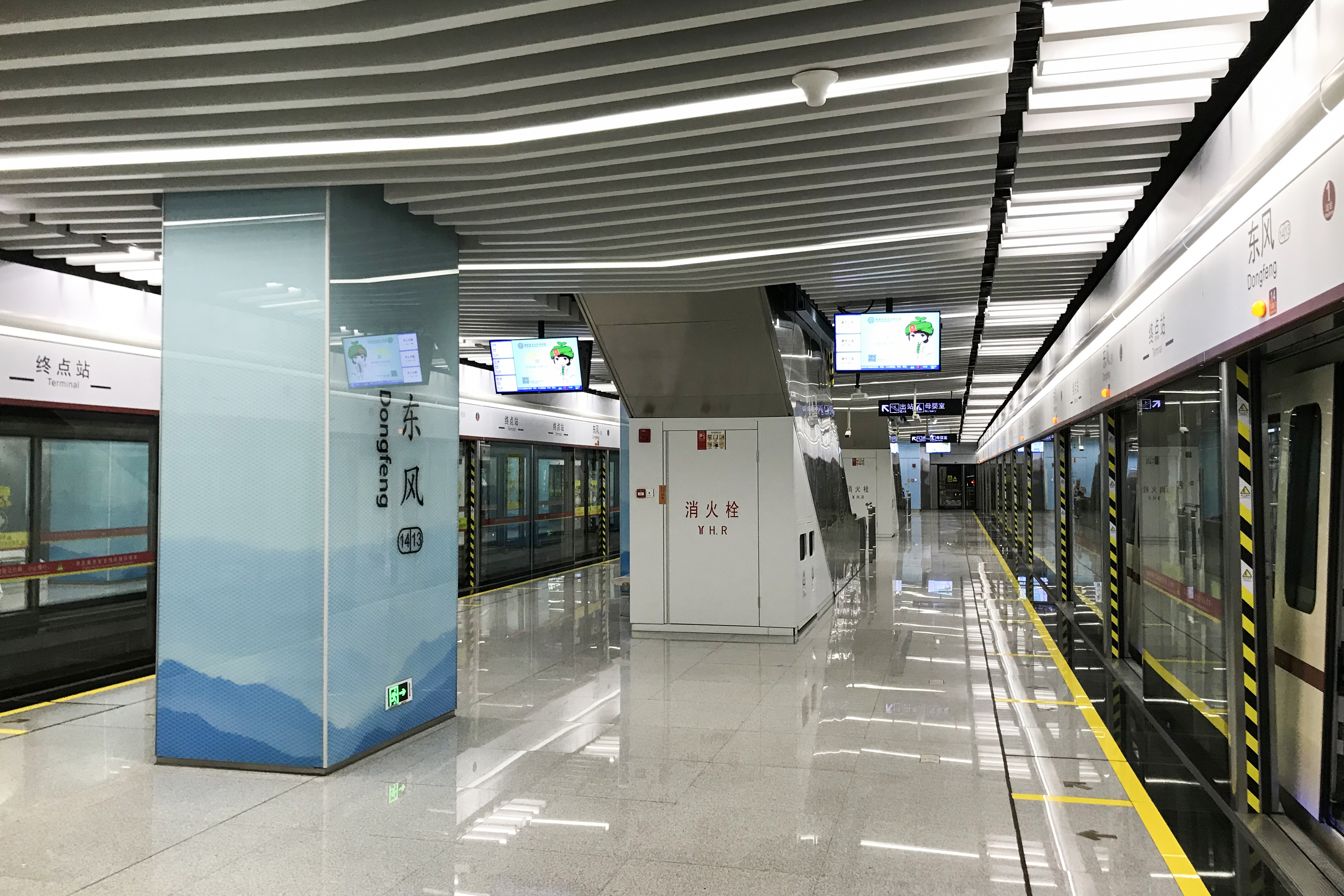 广州地铁东风站